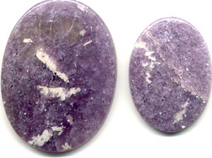 лепидолит